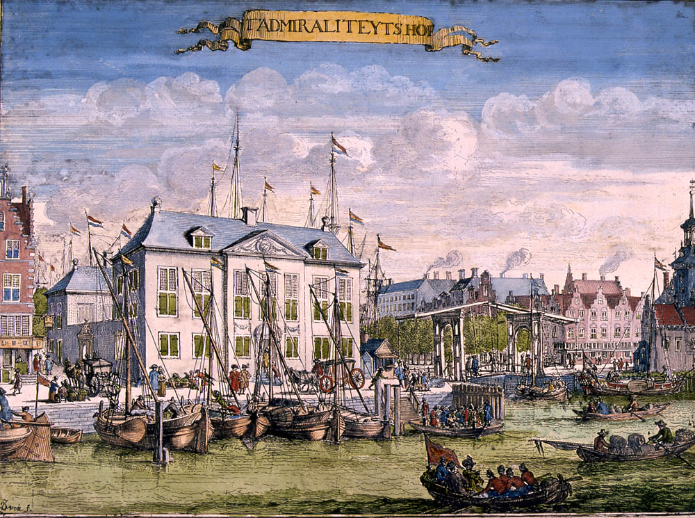 Admiraliteitshof van de Admiraliteit van Rotterdam